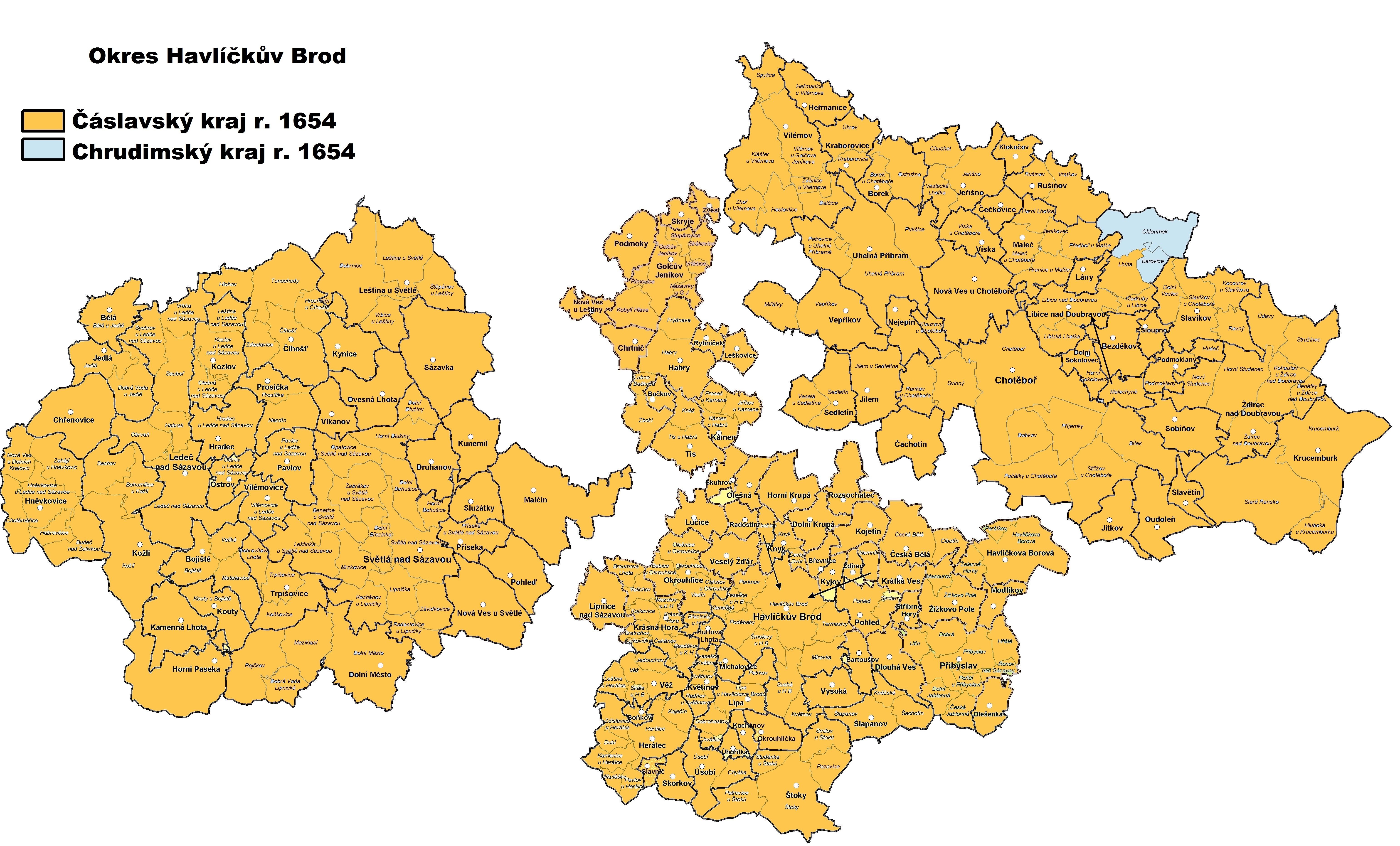 Čáslavský kraj r. 1654 v dnešním okrese Havlíčkův Brod